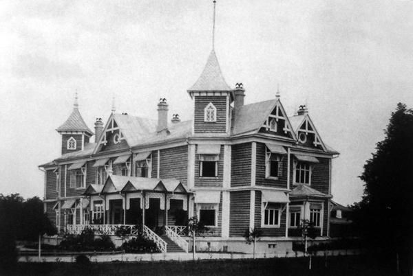 Первинний садибний будинок маєтку фон Мекк (Копилів)